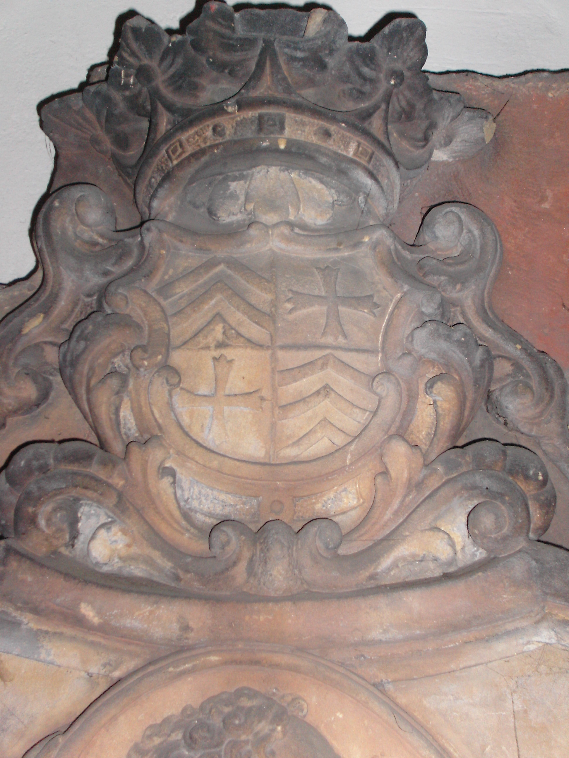 Bischof Heinrich Hartard von Rollingen, Speyer, Wappen